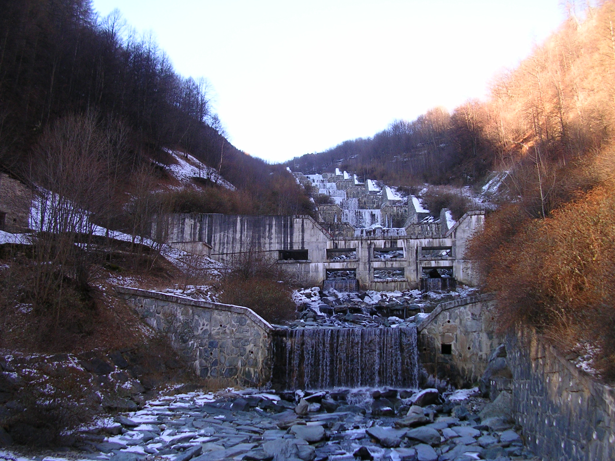 Il torrente "Torreggio"